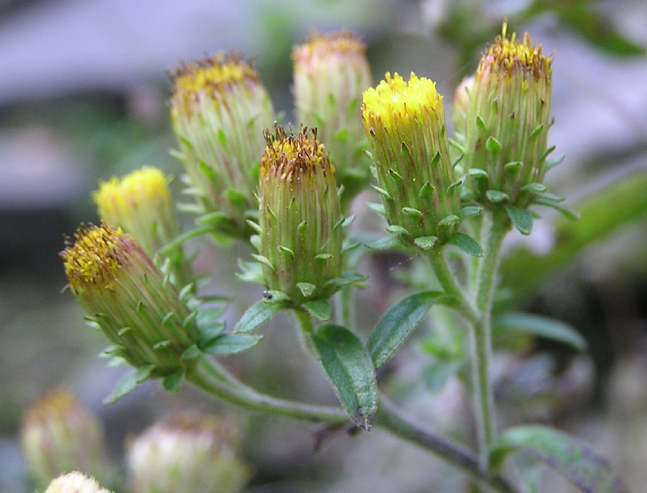 Blütenköpfchen von Inula conyzae, gefunden auf der Ruine Tomburg bei Rheinbach (Deutschland).